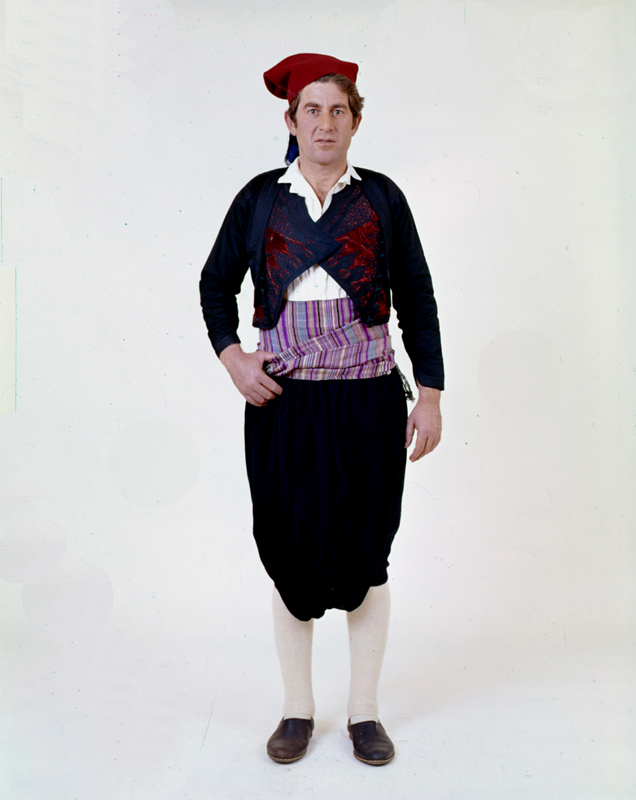 Ανδρική φορεσιά Ύδρας, με τη χαρακτηριστική "βράκα". Απαντάται με διαφορές σε όλο το Αιγαίο. Συλλογή Πελοποννησιακού Λαογραφικού Ιδρύματος, Ναύπλιο